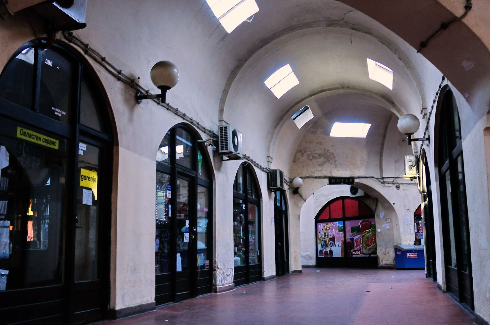 Bezisten Bitola